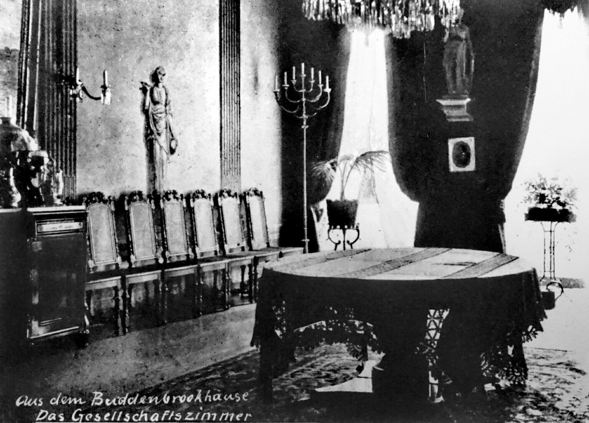 Buddenbrookhaus Speisesaal